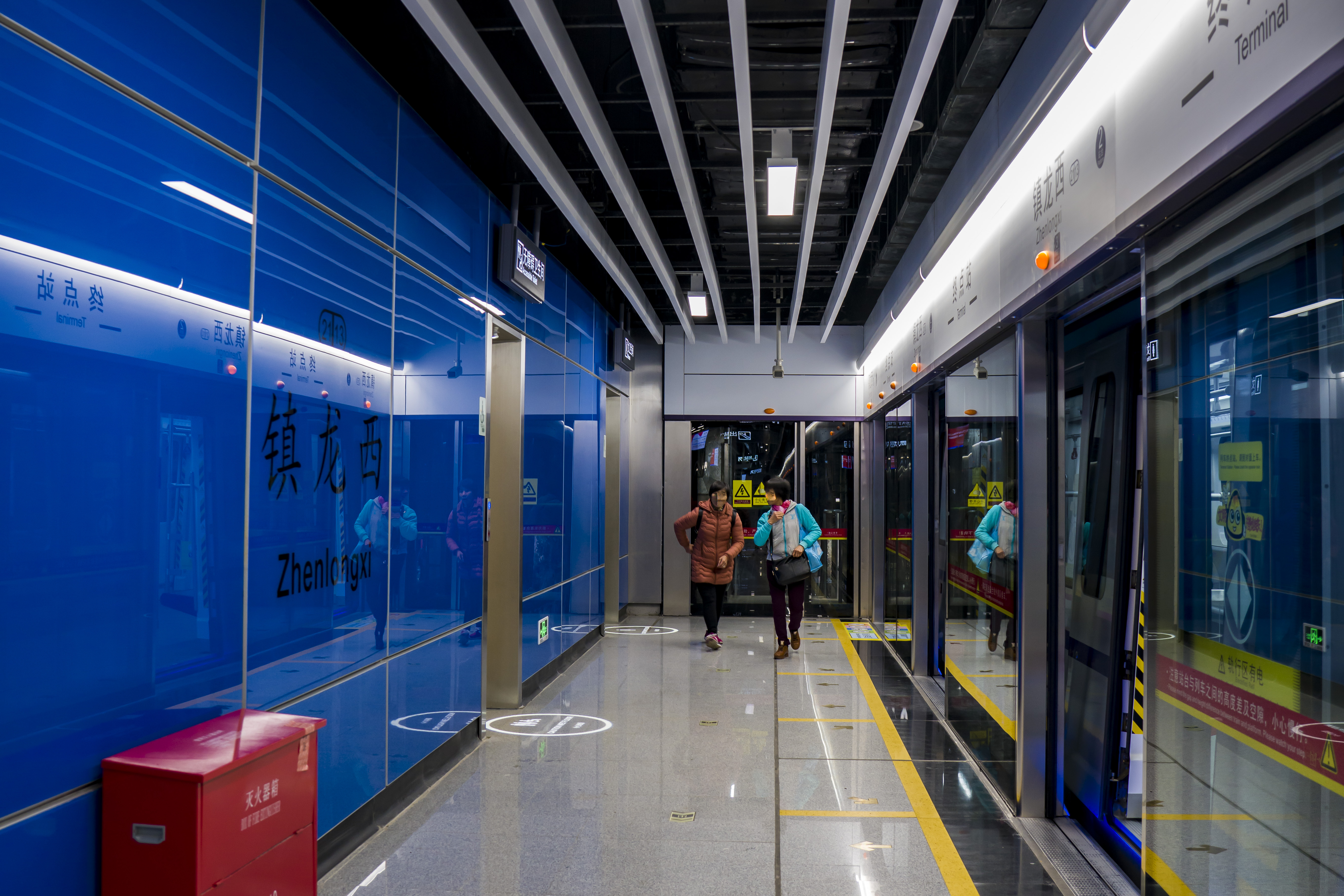 镇龙西站2号月台